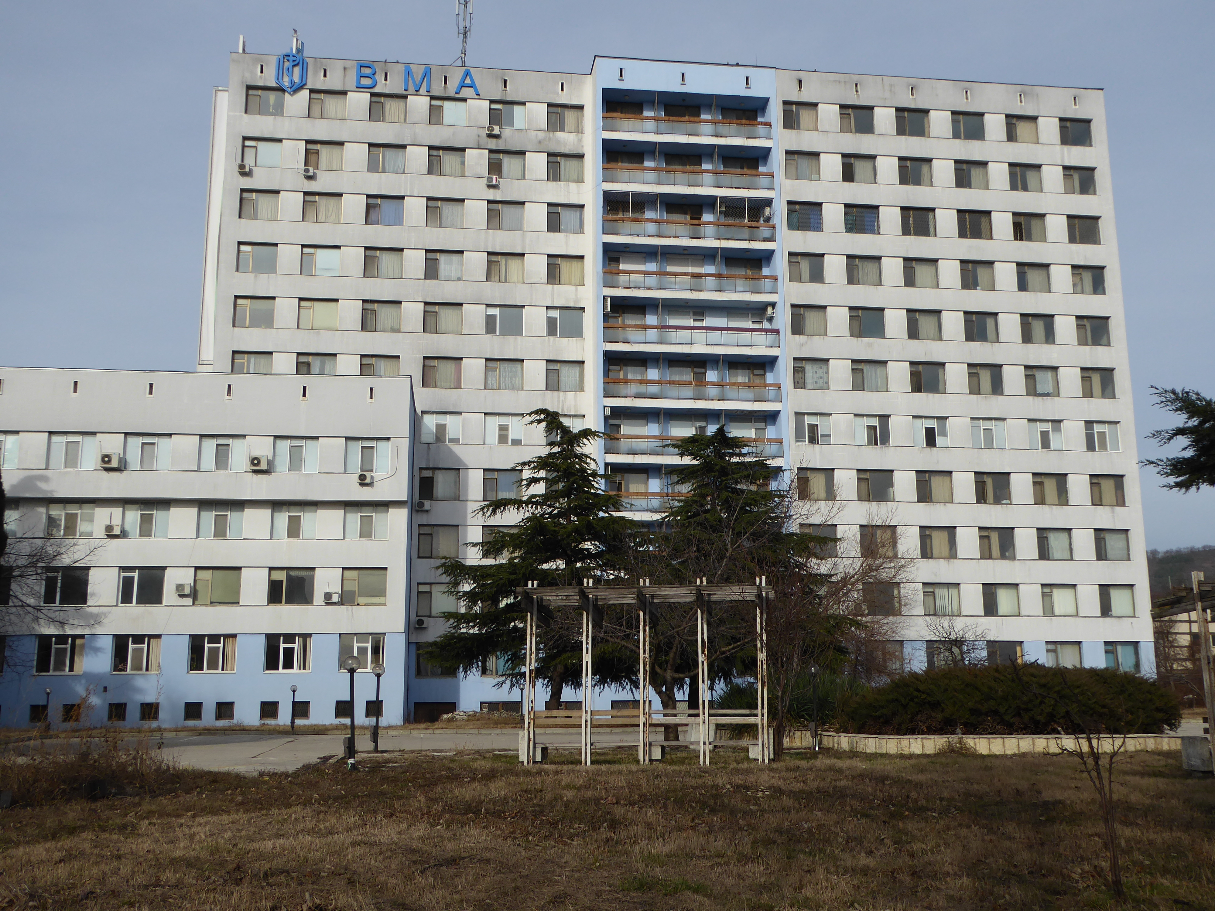 Военноморска Болница Варна